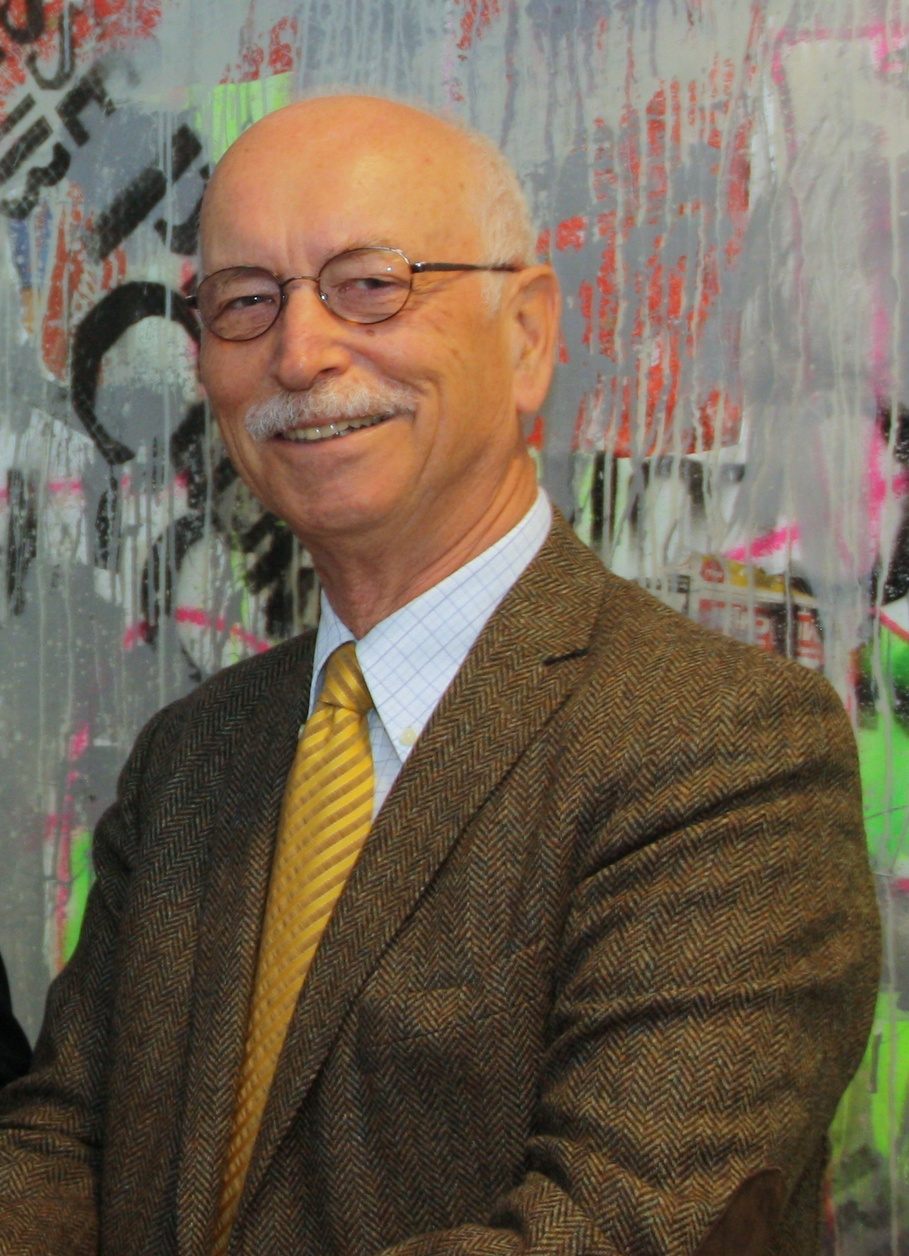 Peter Schmalz , deutscher Journalist und Vorsitzender des Internationalen Münchner PresseClubs. HIer am 7. April 2017 in den Räumen des PresseClubs. Titel des Werks: "Peter Schmalz (2017) im Münchner PresseClub".